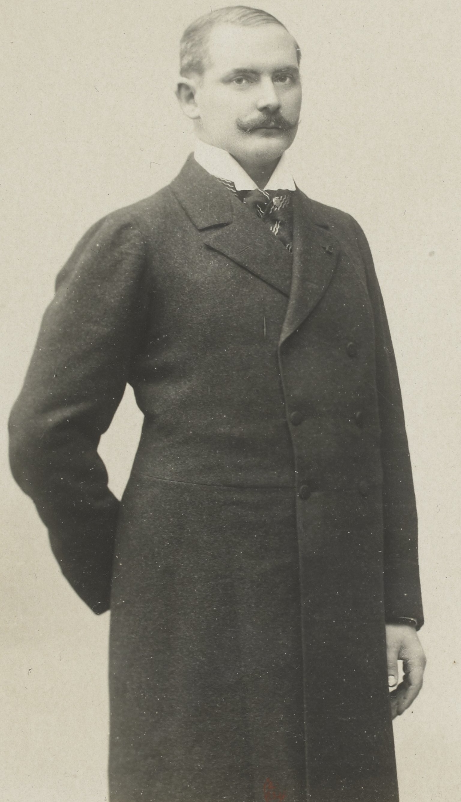 Exposition universelle de 1900 : portraits de Theodor Lewald.